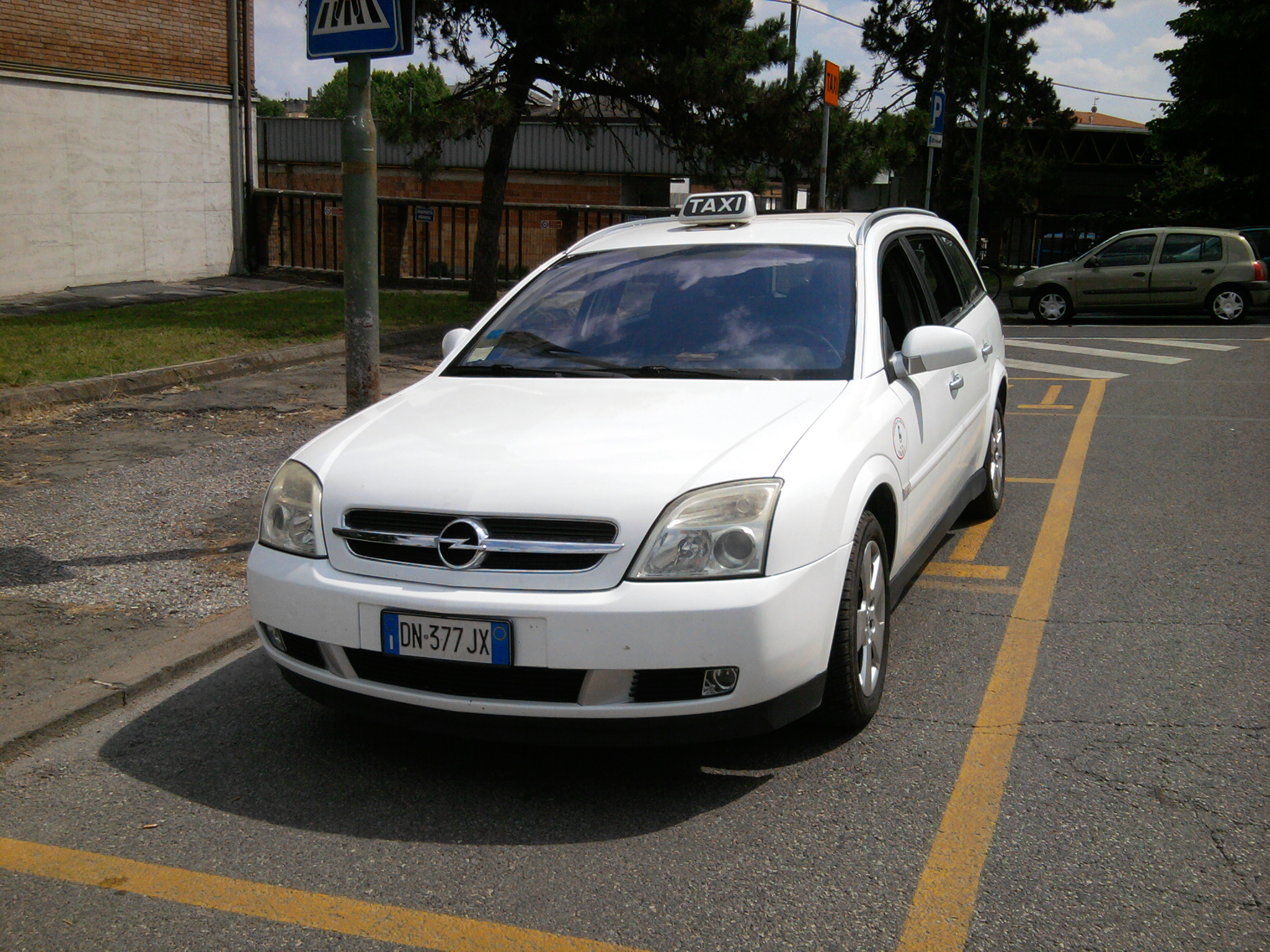 Rovigo, stazione ferroviaria: parcheggio taxi Opel Vectra SW.